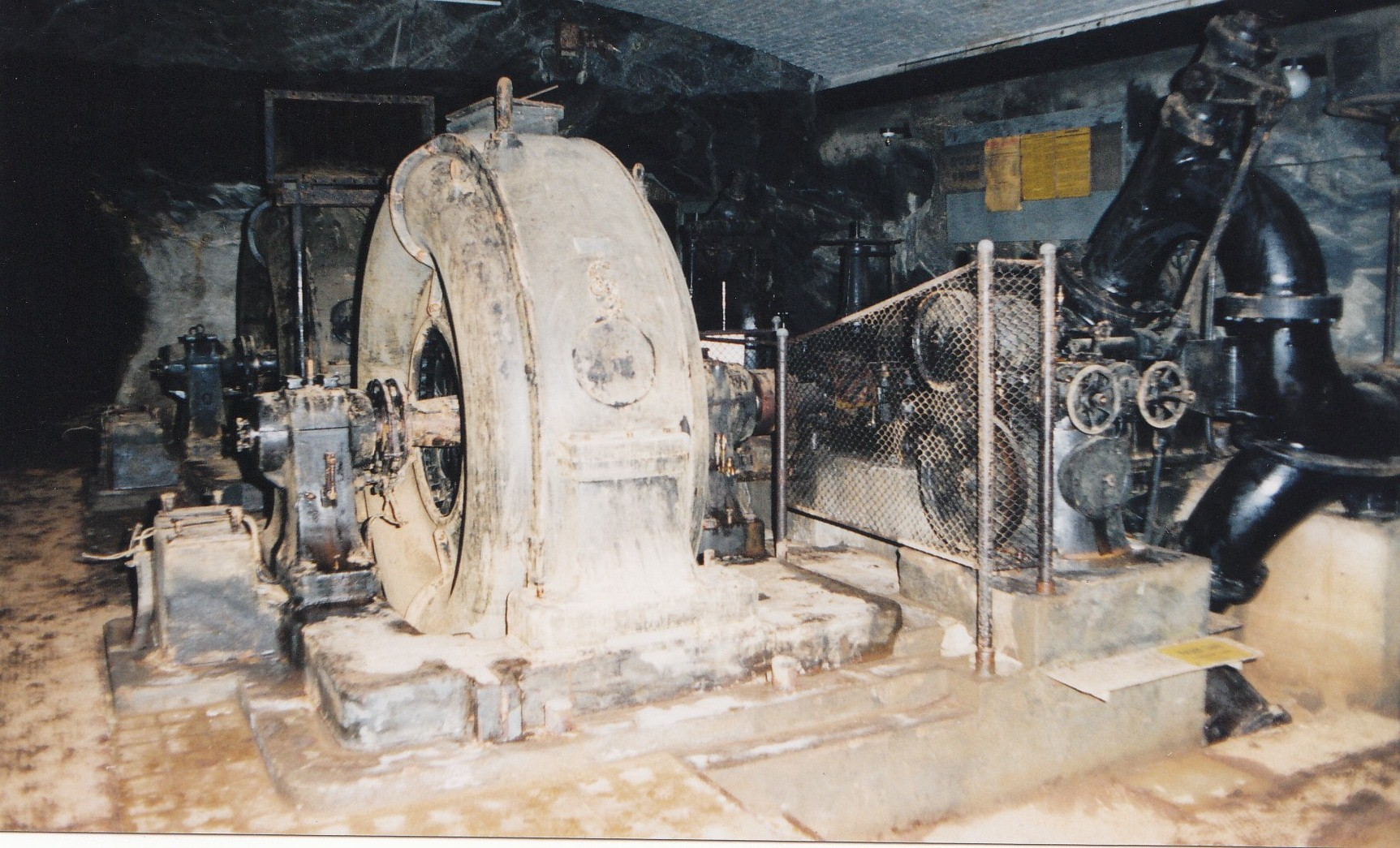 Turbine und Generator im Unterwerk des ehemaligen Kavernenkraftwerks Drei-Brüder-Schacht.